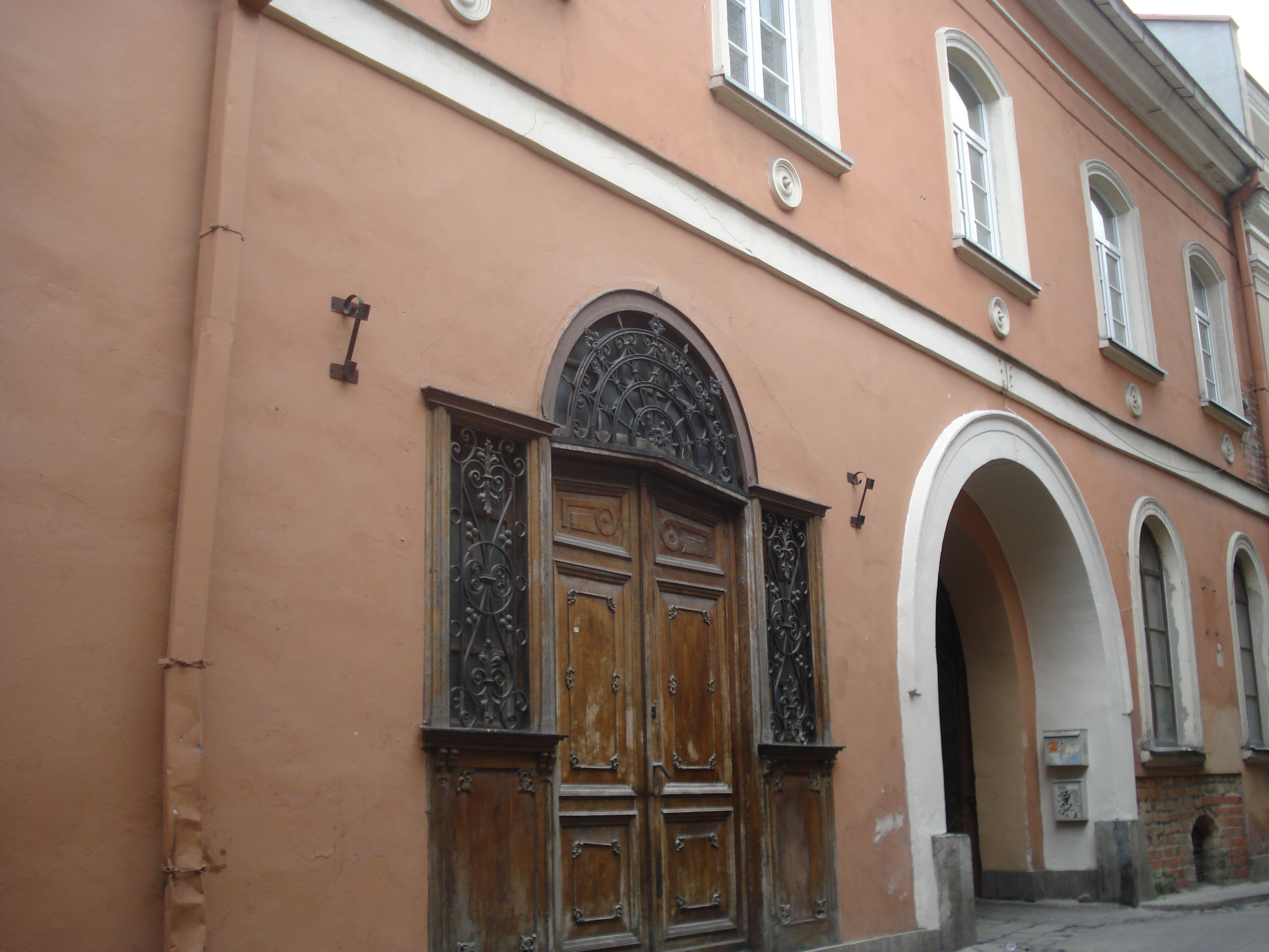 Švento Kazimiero gatvė (St Casimir street) in Vilnius